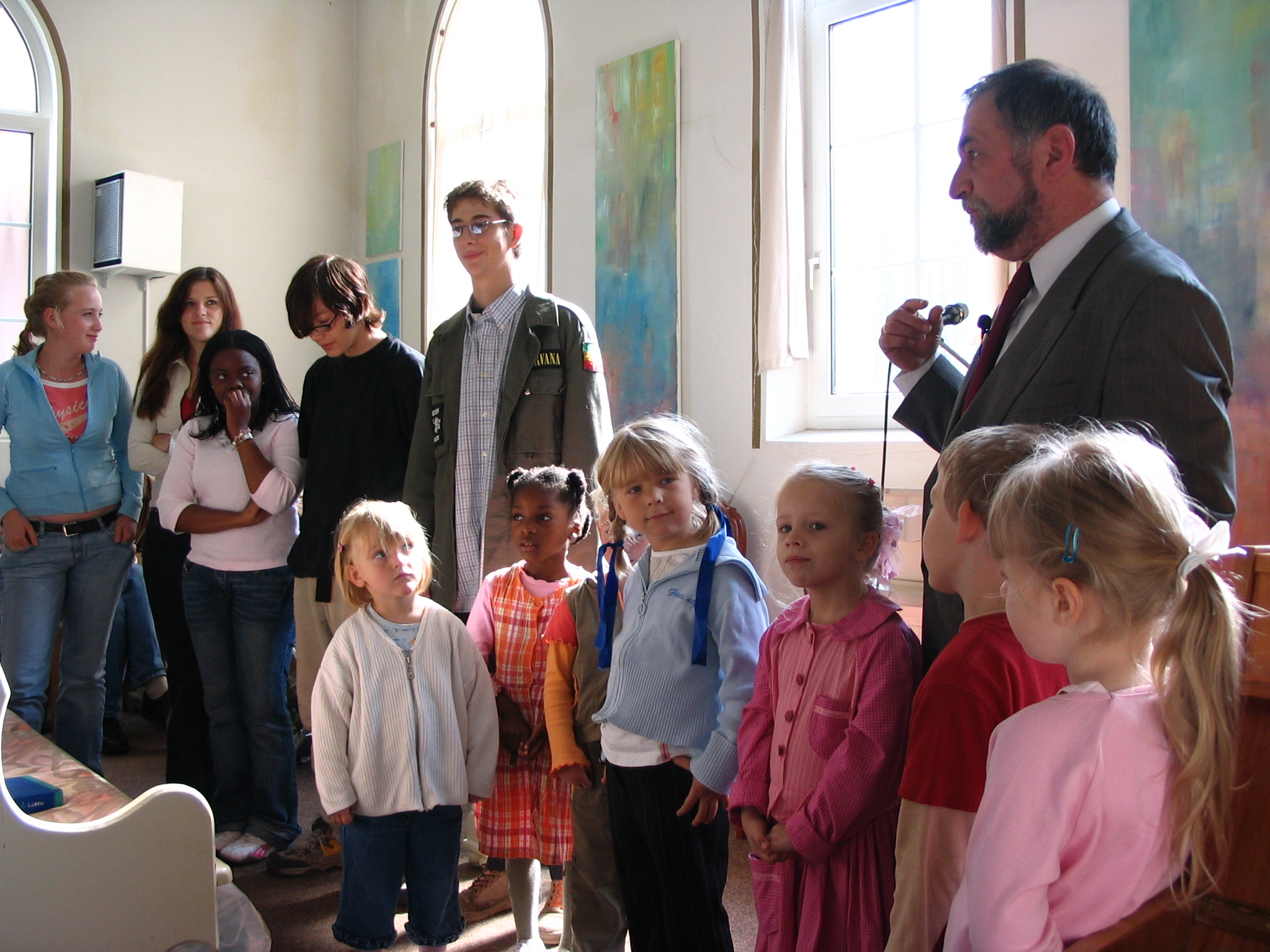 Evangelisch-Freikirchliche Gemeinde Jever heute 021